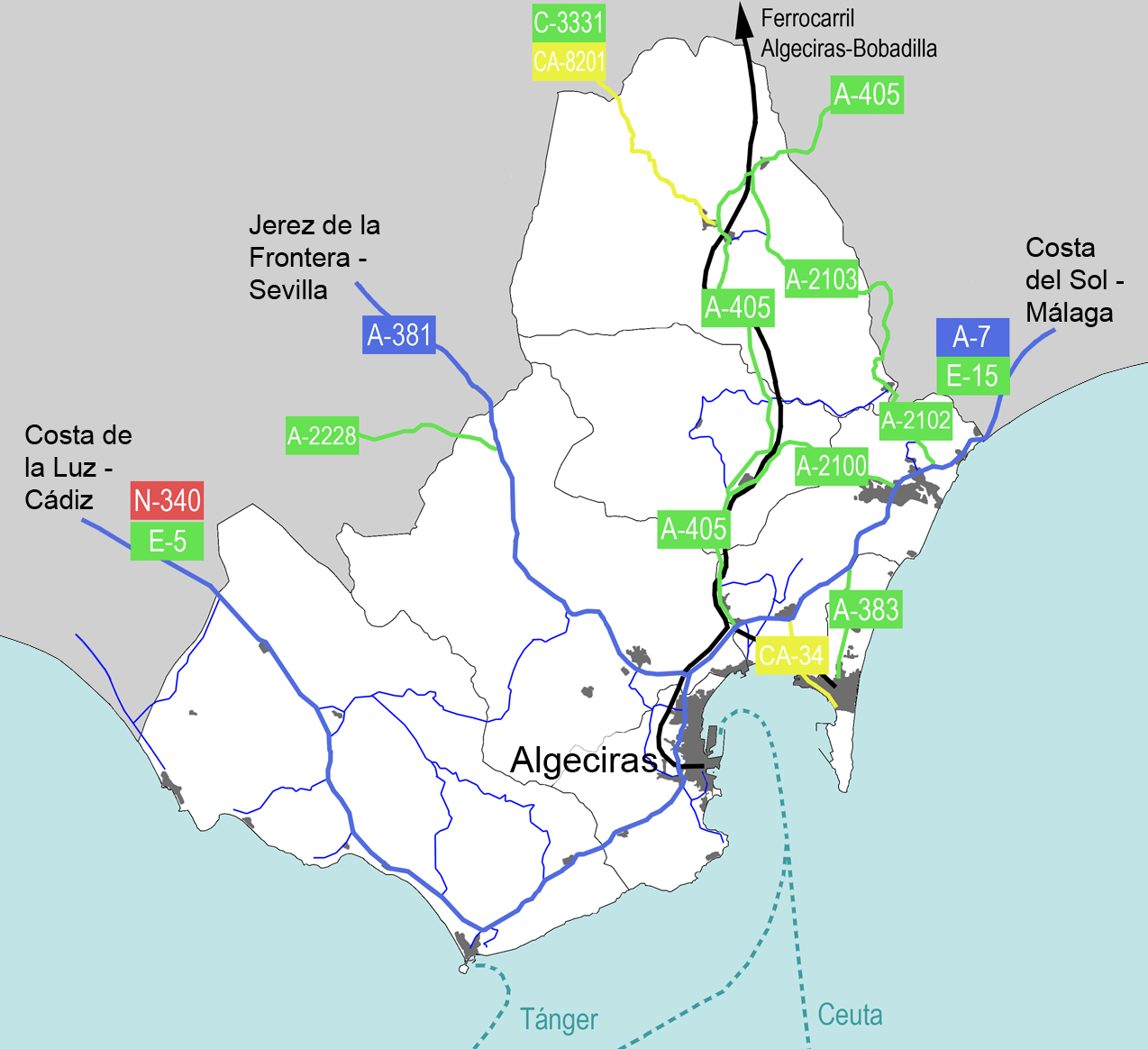 Mapa indicativo de las vías de comunicación del Campo de Gibraltar, Andalucía, España